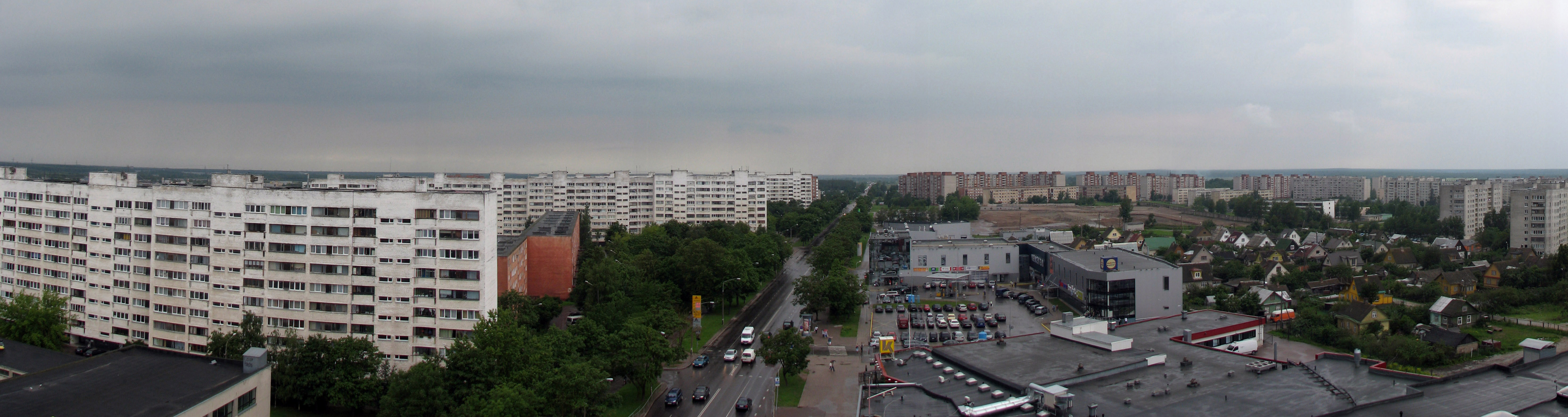 Panorama of Narva, Estonia. Year 2008